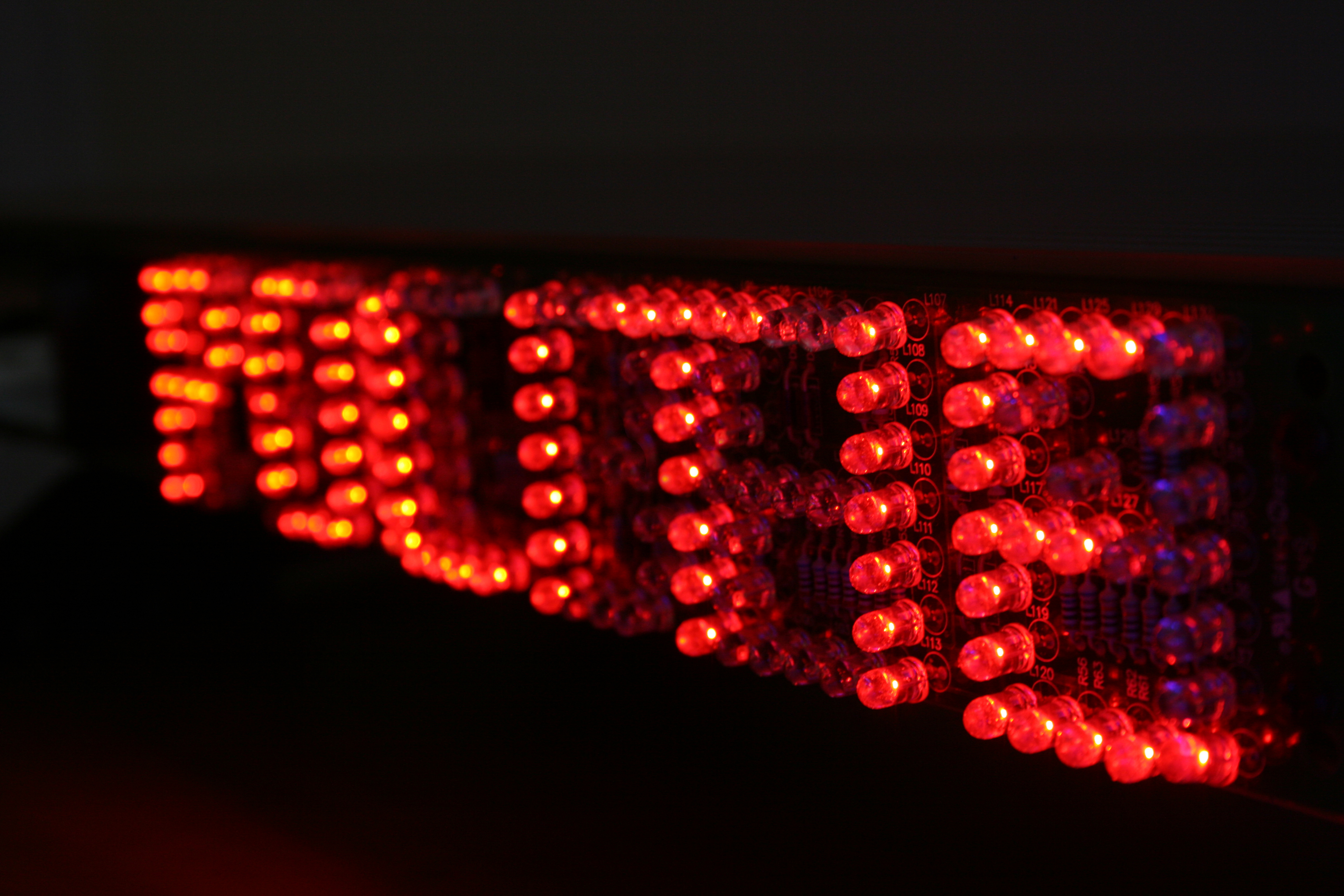 Stopbordje